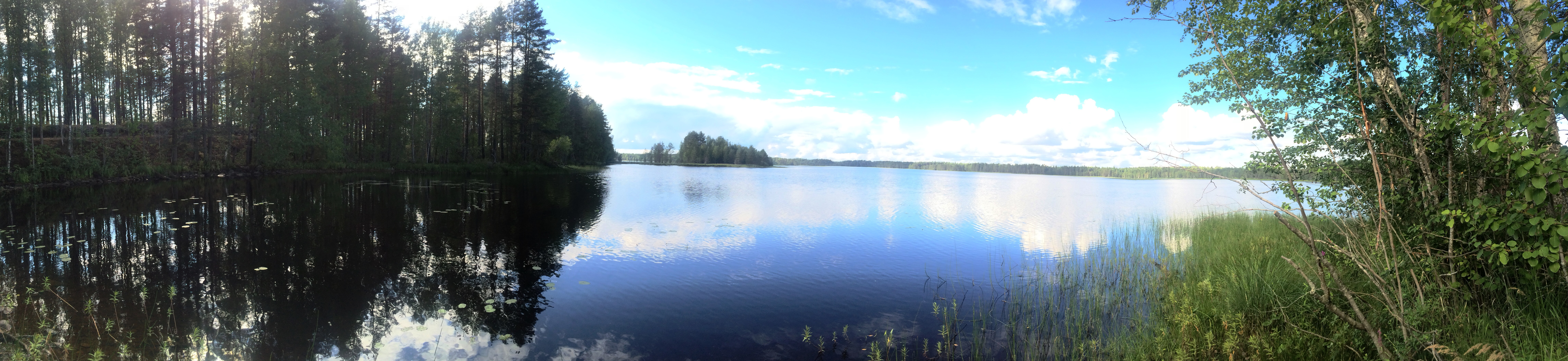 Лакшозеро